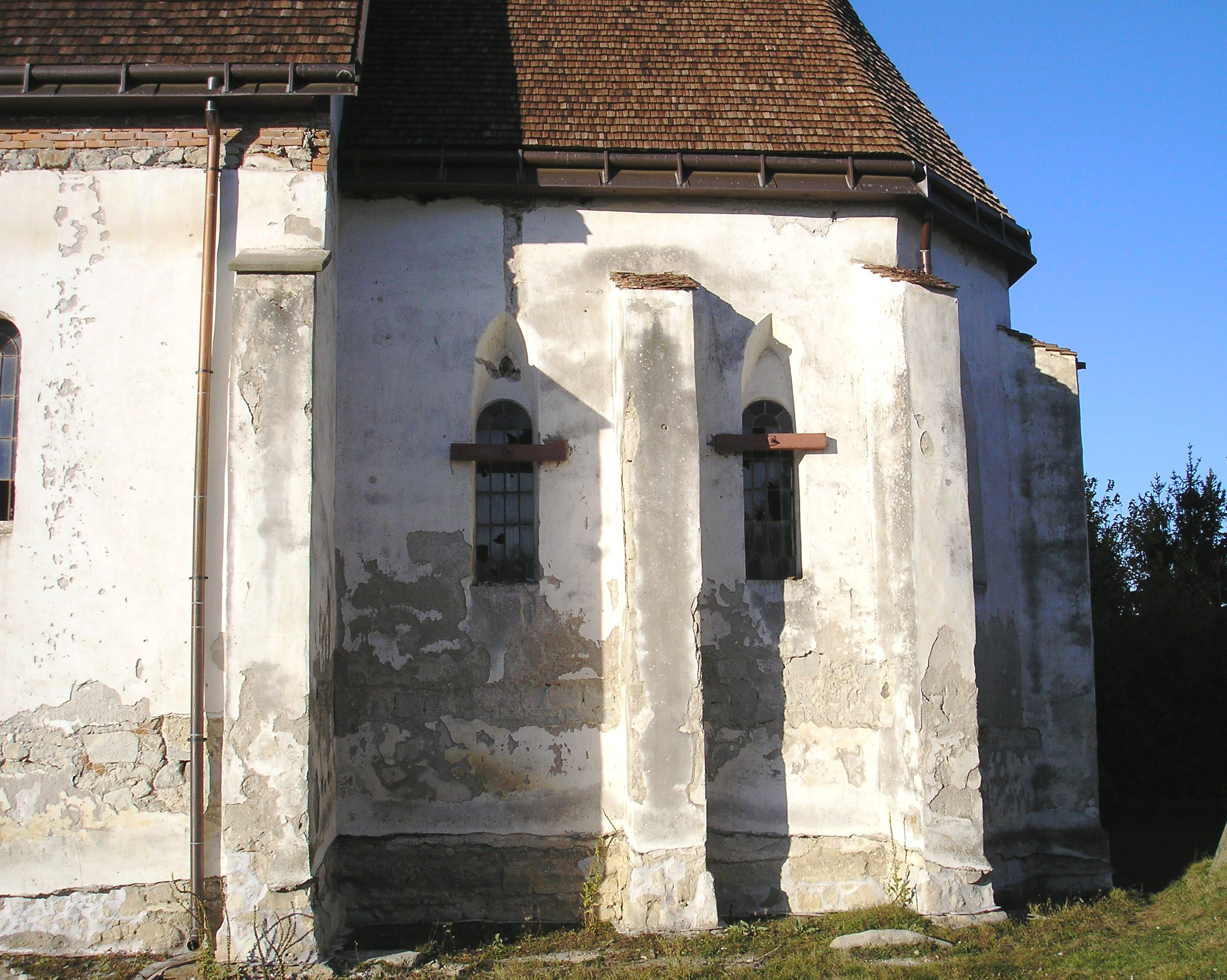 Abaújvár református templom